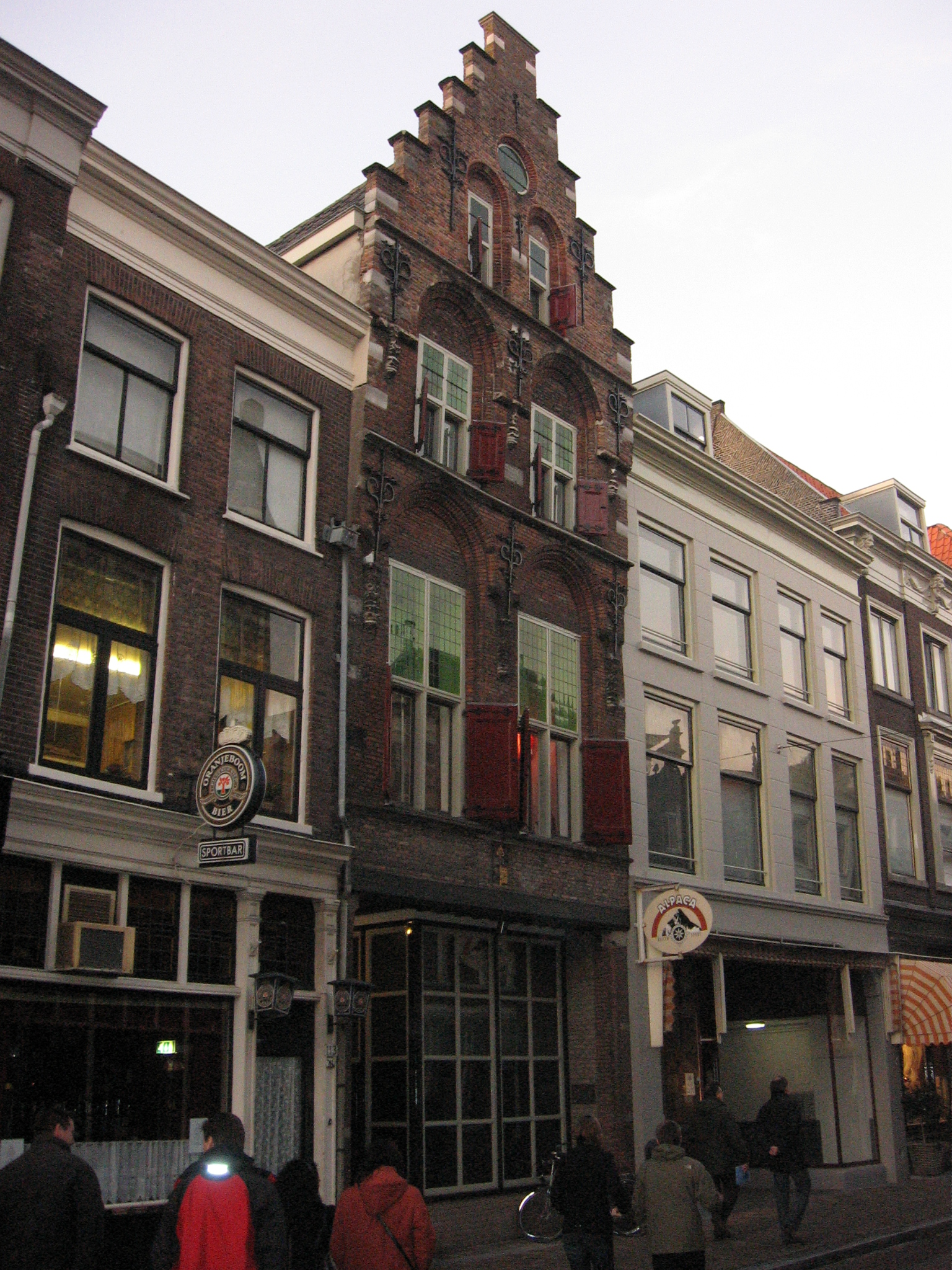 Huis de Sleutel